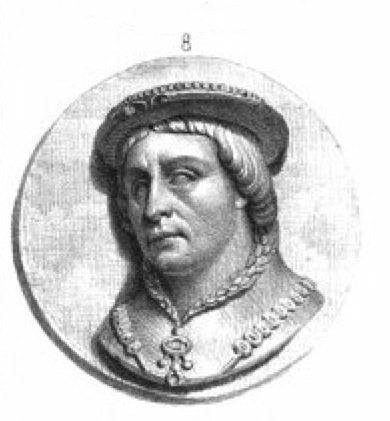 Album du Dauphiné - tome IV, litographie des Dauphins : 8. Humbert Ier de Viennois